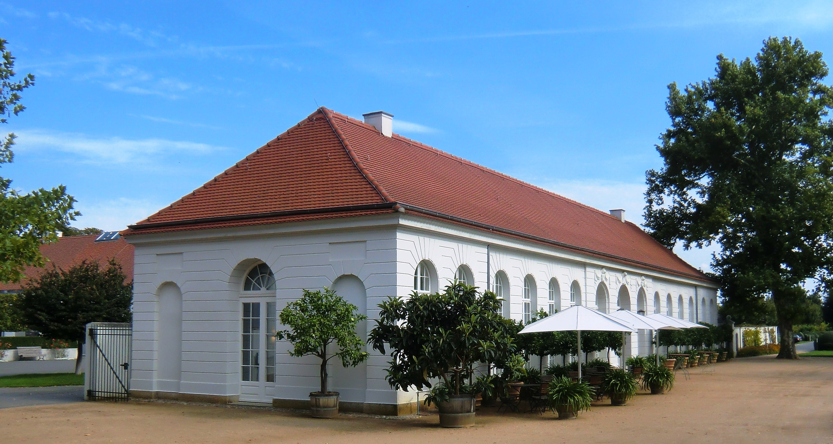 Orangerie des Schlosses Neuhardenberg im Ort Neuhardenberg im Bundesland Brandenburg (von der Parkseite aufgenommen).